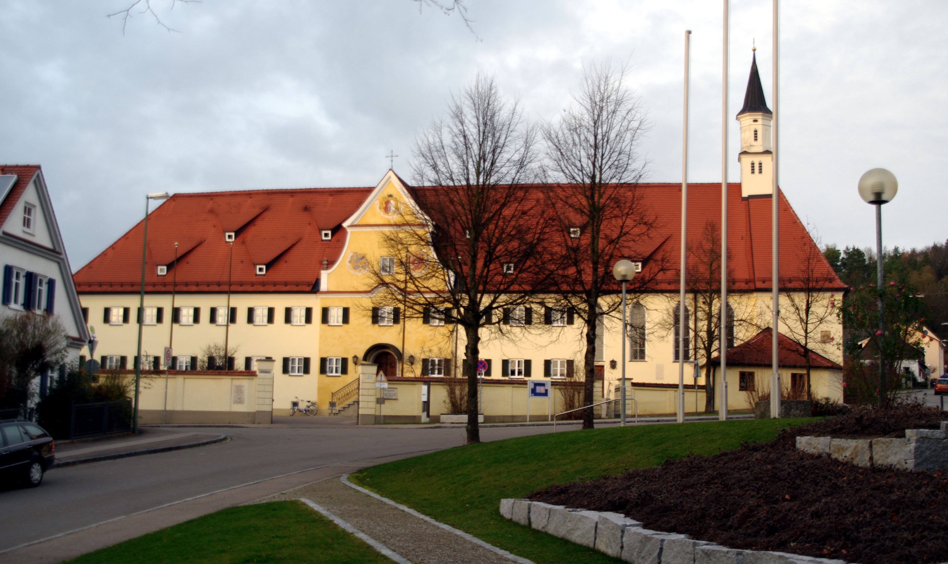 Hospitalstiftung Dinkelscherben